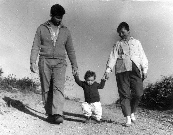 משפחה בטיול